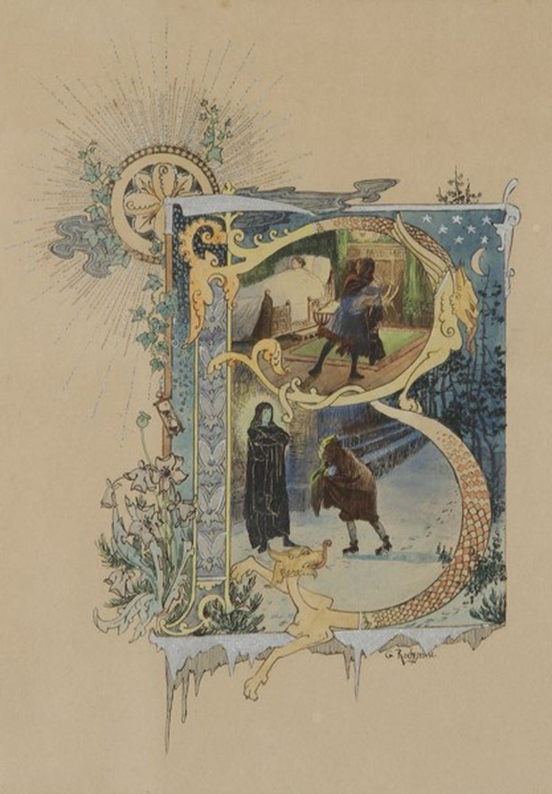 Illustration par Rochegrosse pour un conte de Jérôme Doucet